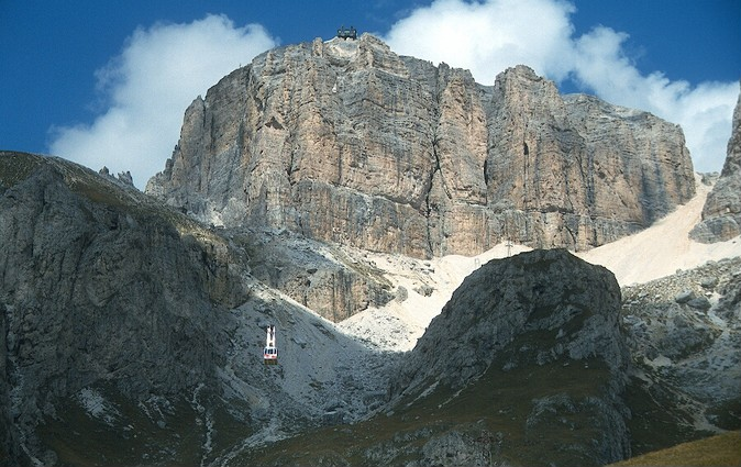 La funivia che porta alla cima del Sass Pordoi (Canazei, Passo Pordoi)